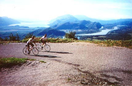 Membres de la Confrérie des Fêlés du Grand Colombier dans l'ascension de la face sur est du Col du Grand Colombier, un des cols les plus difficiles de France